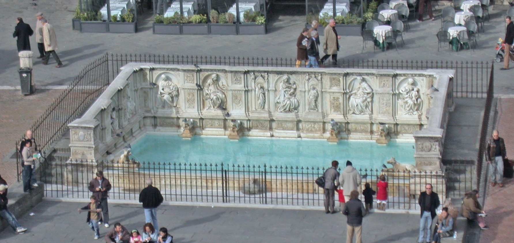 Italia, Siena, Fontana di piazza del Campo, dalla Torre del Mangia